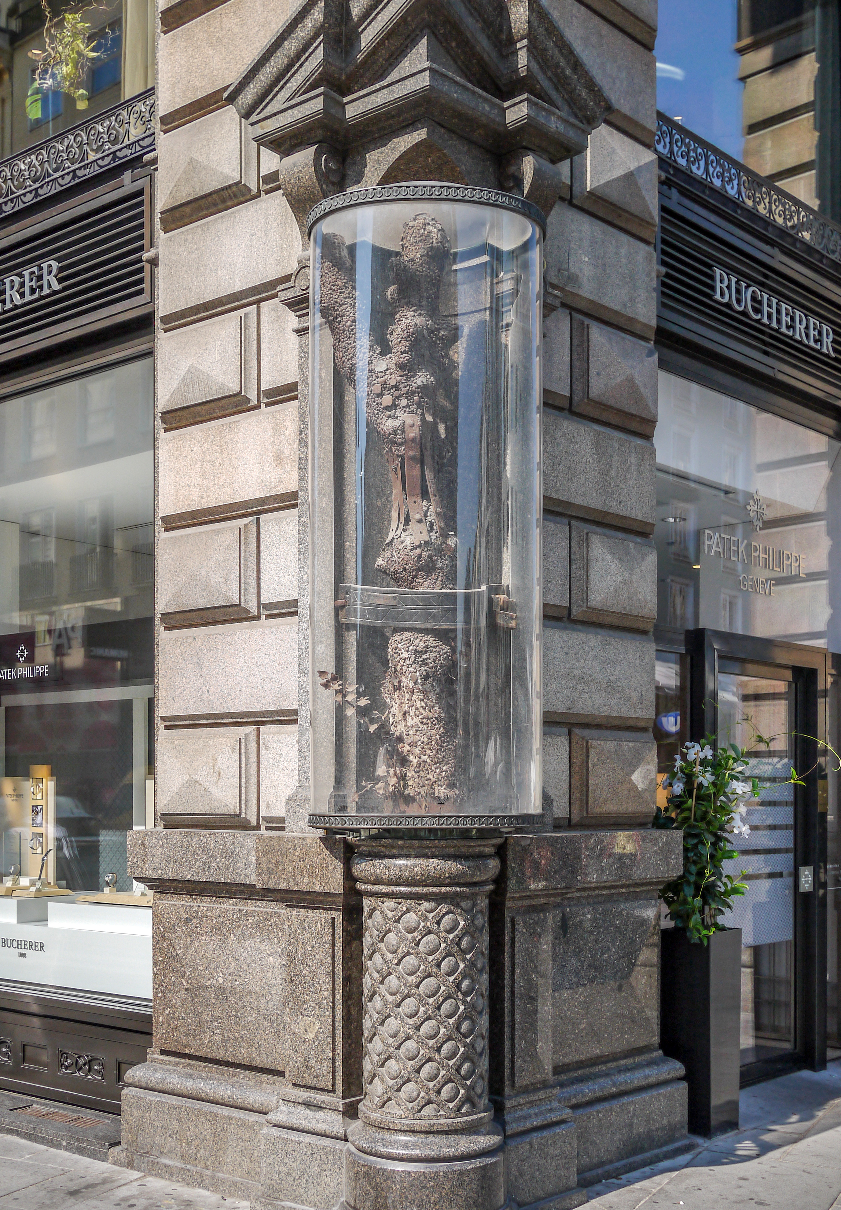 Hauszeichen, Stock im Eisen